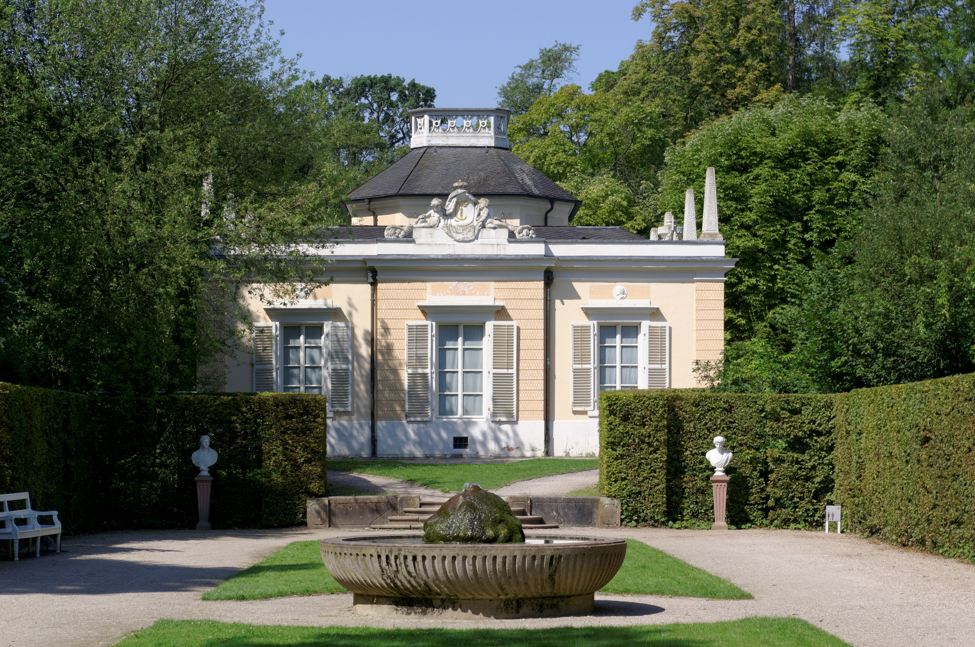 Schwetzingen, Schloßgarten, Badhaus